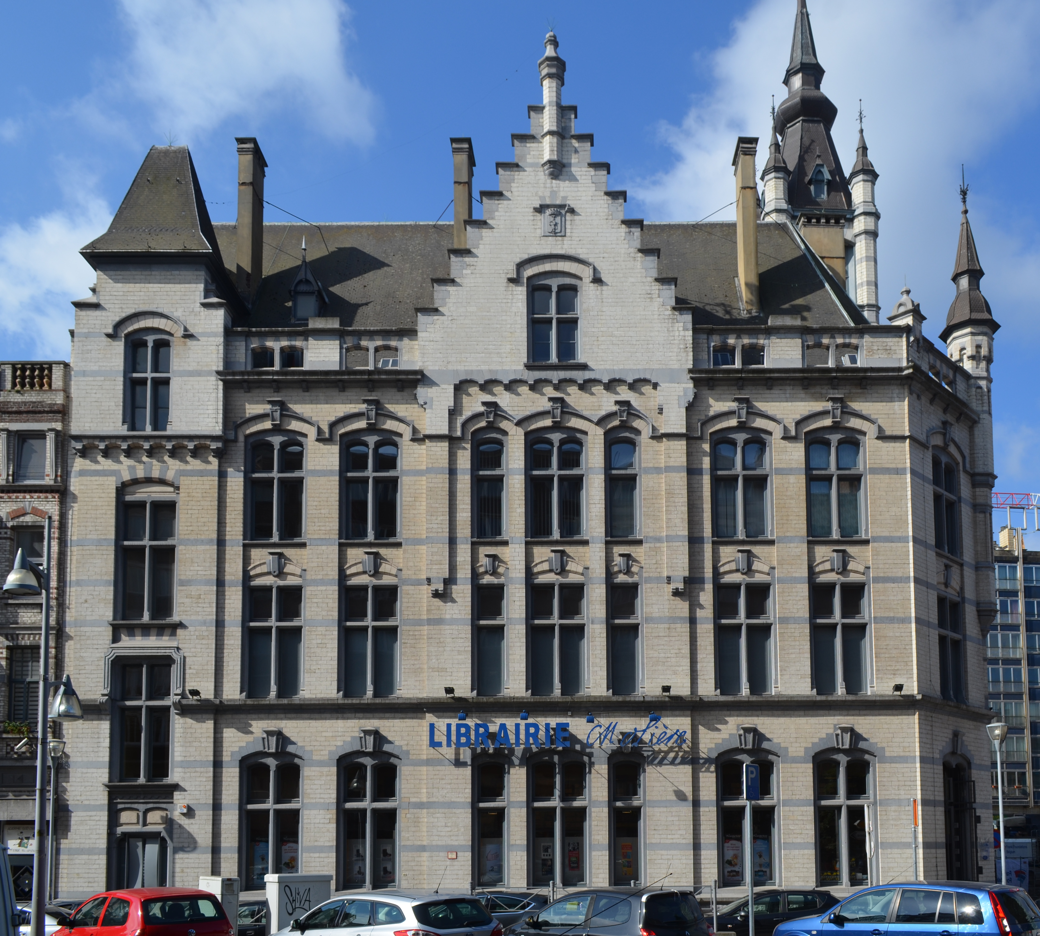 Ancien hôtel des Postes de Charleroi. Immeuble construit en 1907 dans le style néo-Renaissance flamande. Situé au boulevard Joseph Tirou, il fut classé en 1992 et abrite une librairie depuis 1996. Façade nord côté boulevard Tirou.